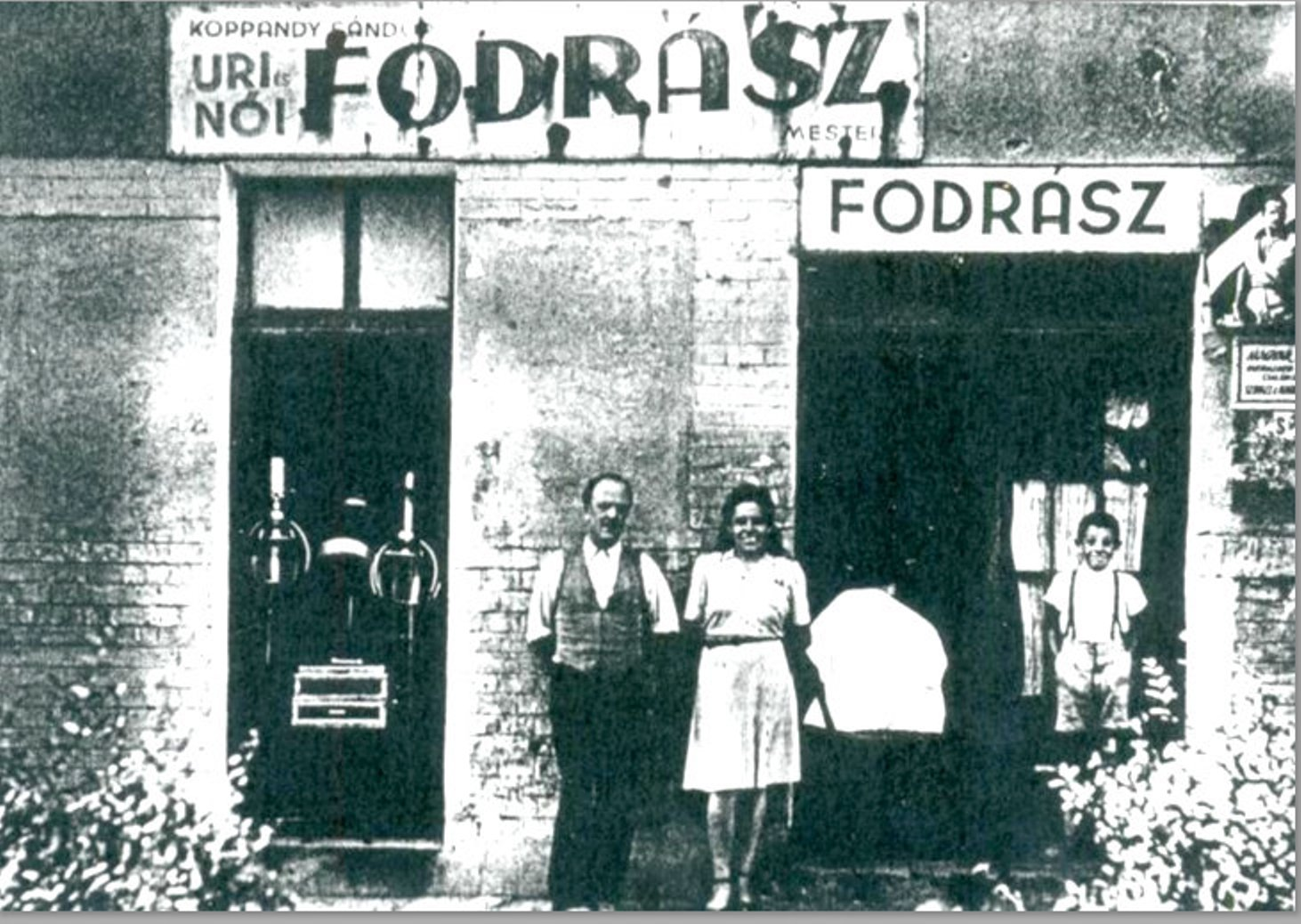 Fodrászüzlet